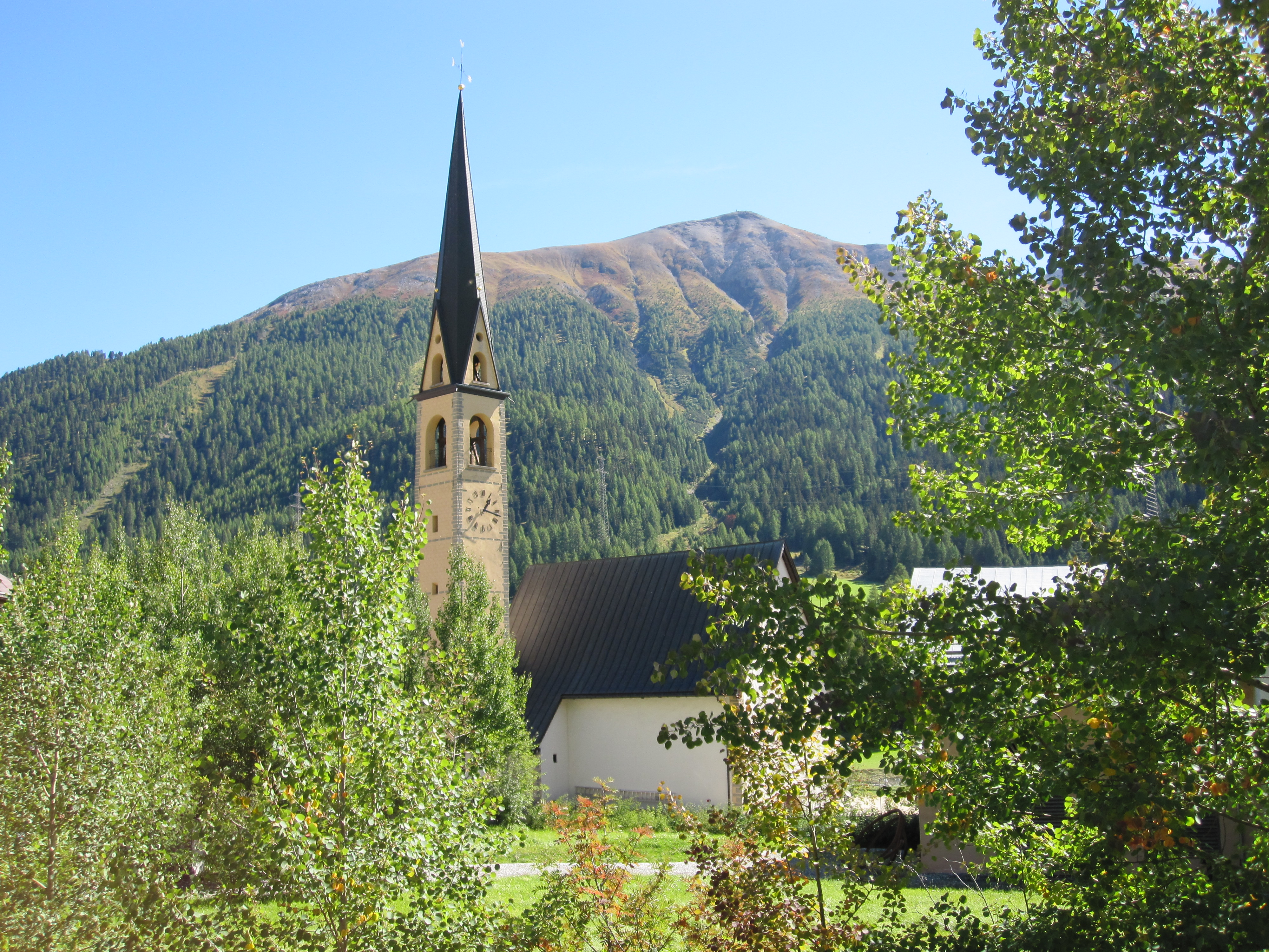 reformierte Kirche S-chanf (im Oberengadin, Kanton Graubünden)